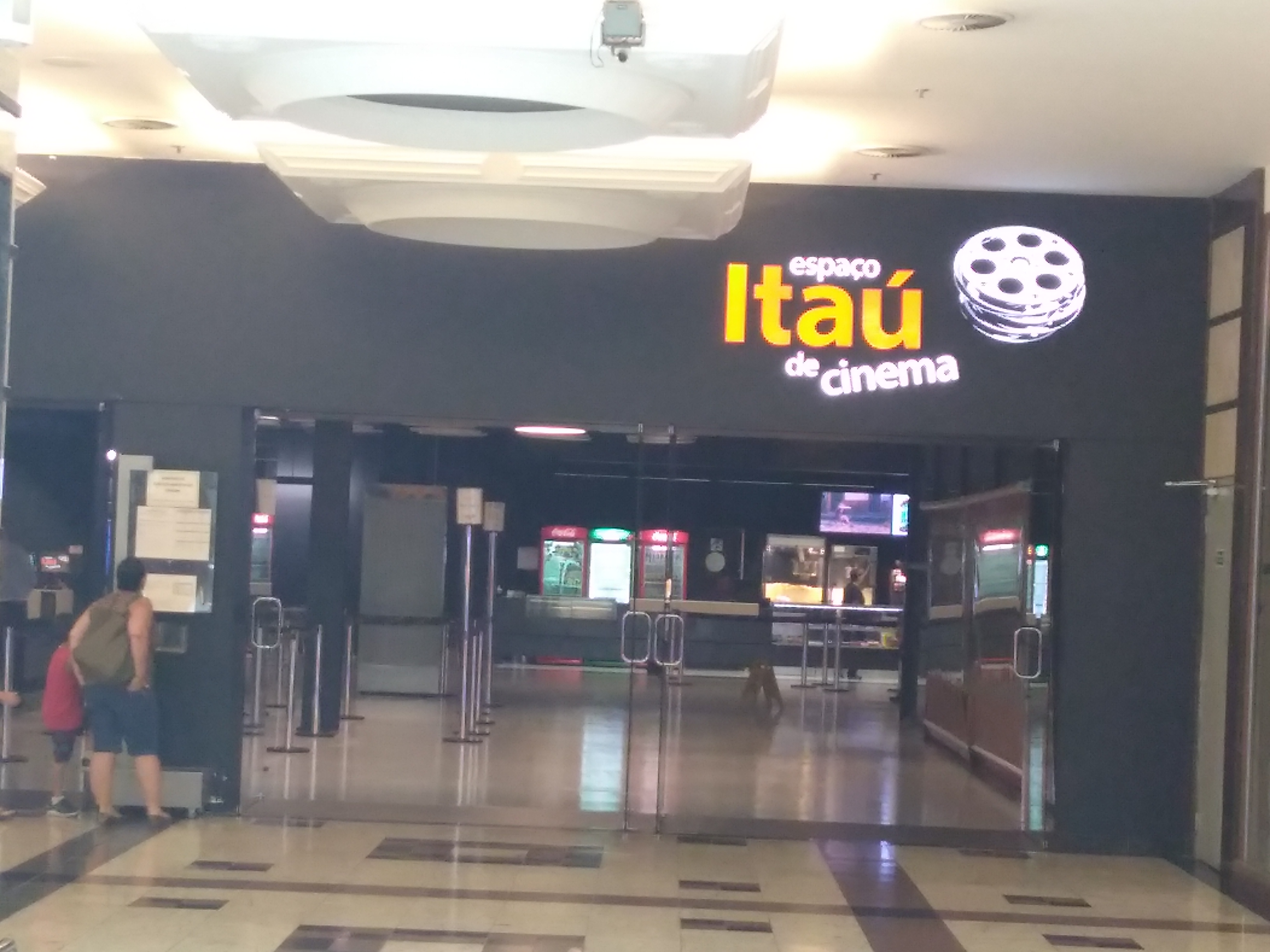 Frente do Espaço Itaú de Cinema Bourbon Country de Porto Alegre, RS